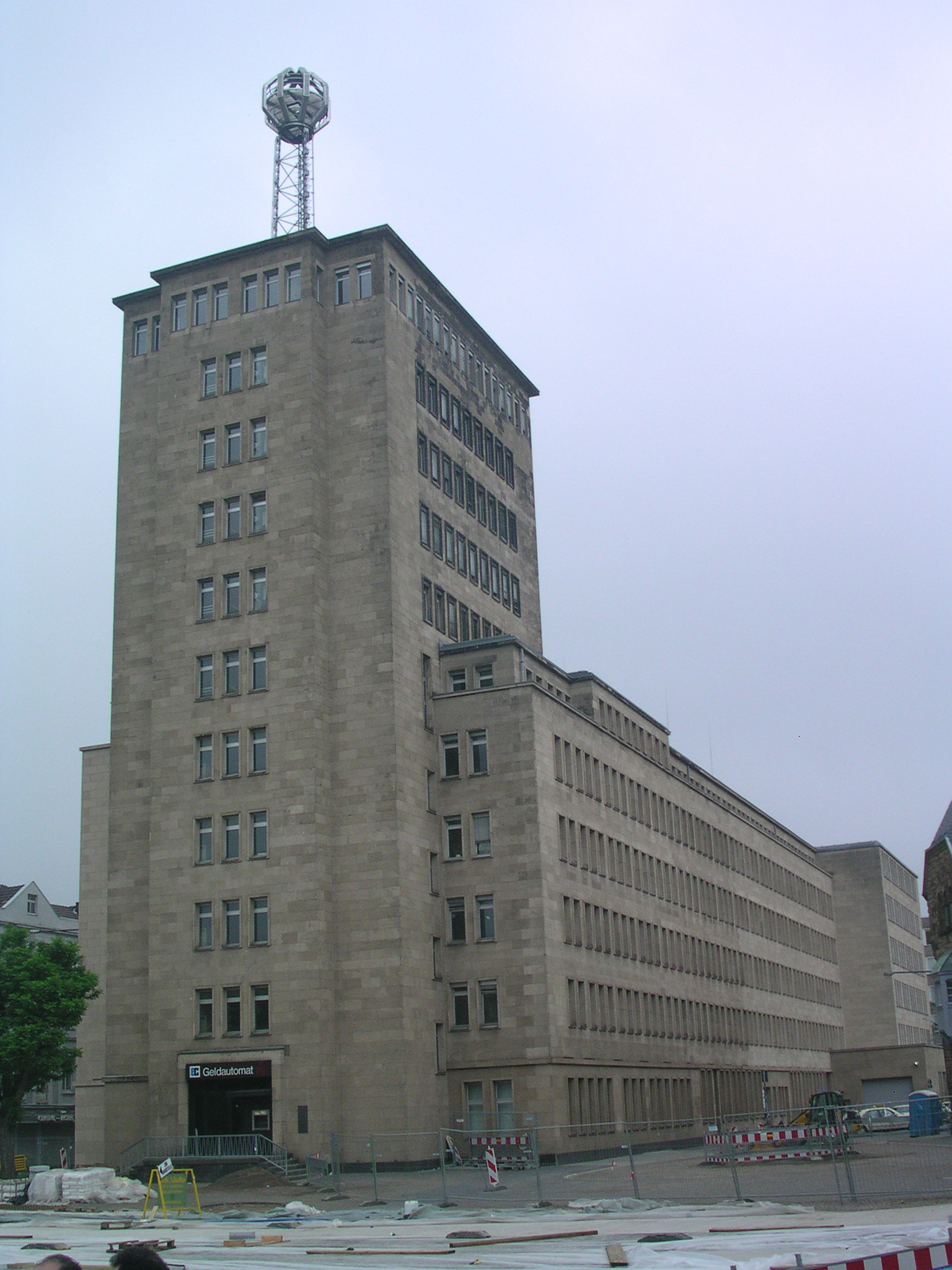 Aachen, Haus Grenzwacht, heute Stadtverwaltung, 1924 von Emil Fahrenkamp begonnen, von Jacob Koerfer stark verändert fertiggestellt. Beachtet die "Wettersäule" auf dem Turm, die nachts mit unterschiedlicher Beleuchtung die Tendenz der Temperatur und Niederschläge ankündigt.